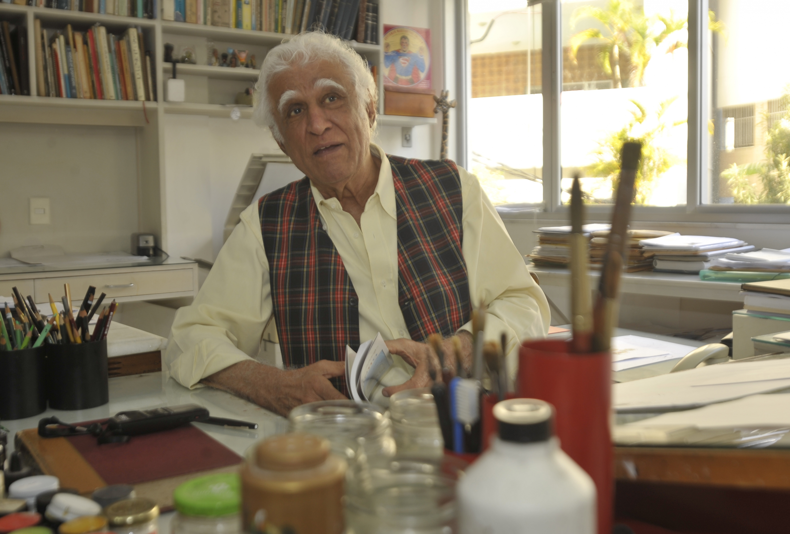 Rio de Janeiro - Com mais de 150 publicações que venderam mais de 8 milhões de exemplares, o escritor, ilustrador e cartunista Ziraldo Alves Pinto é o grande homenageado da 16ª Bienal Internacional do Livro do Rio de Janeiro.